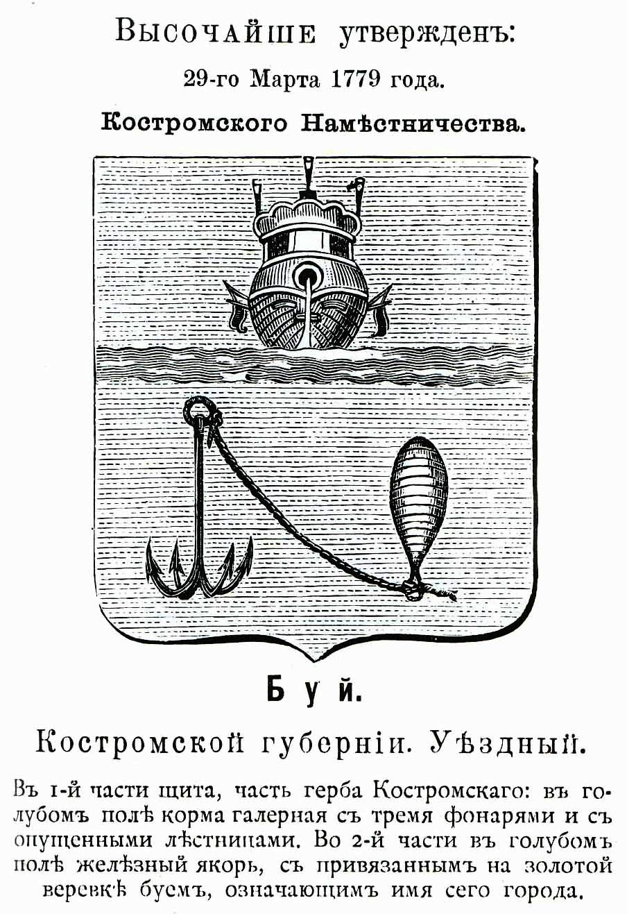 Official Russian Empire coat of arms Bui. Т.н. гласный герб (буй) Российской Империи уездного города Буй Костромской губернии с официальным описанием в Гербовнике Винклера.